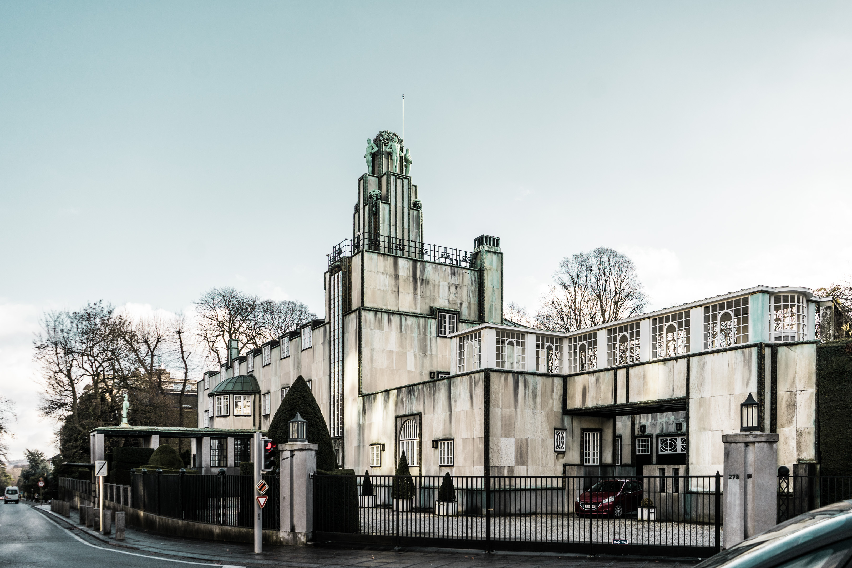 Palais Stoclet depuis l'avenue de Tervuren